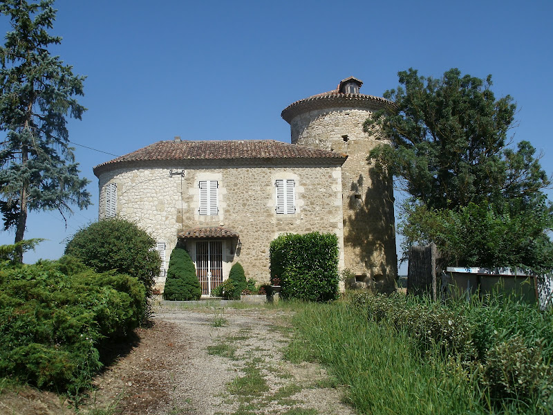 Tour, vestige de l'ancien château de Gavarret-sur-Aulouste